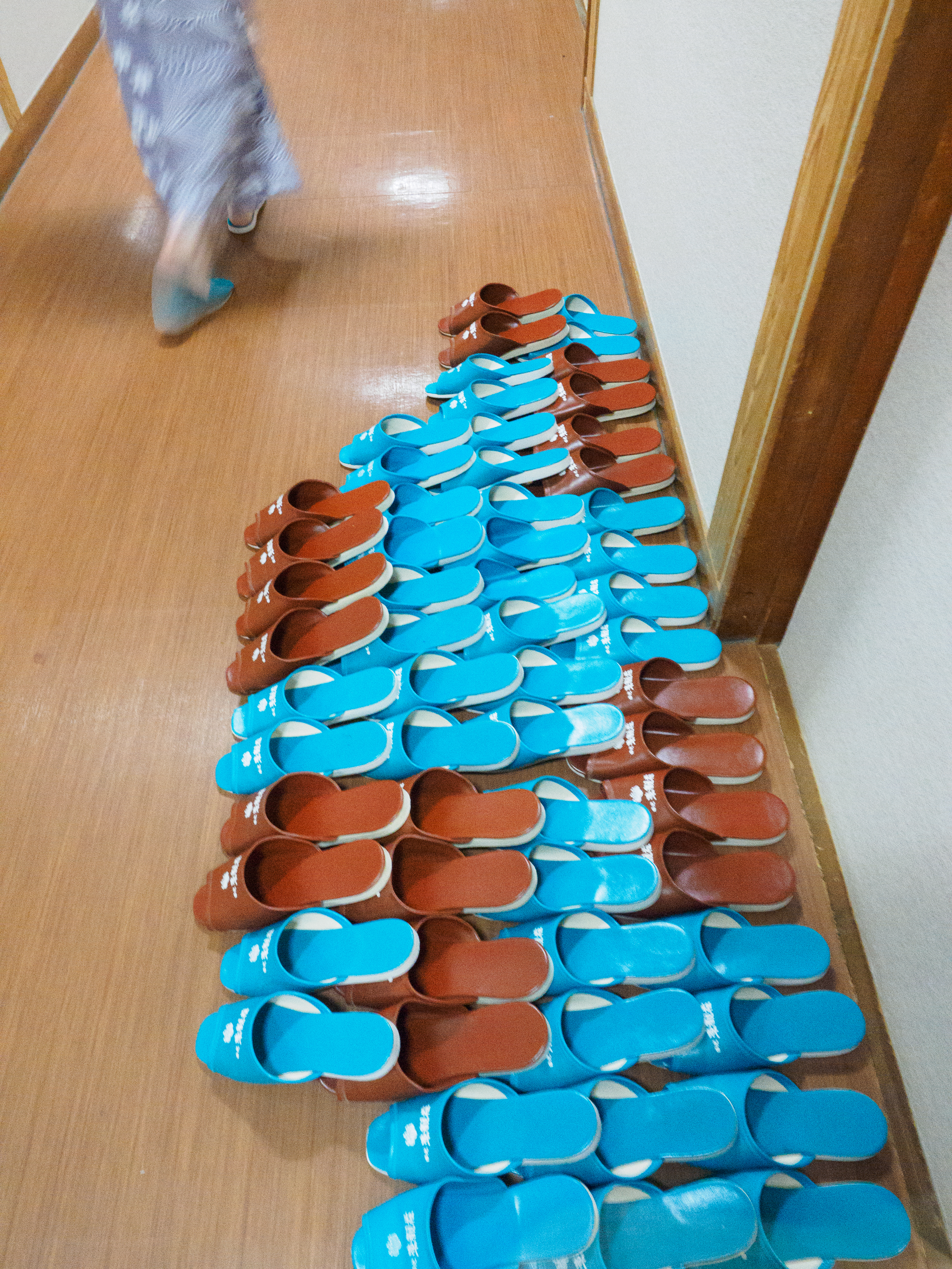 OLYMPUS DIGITAL CAMERA 東觀莊